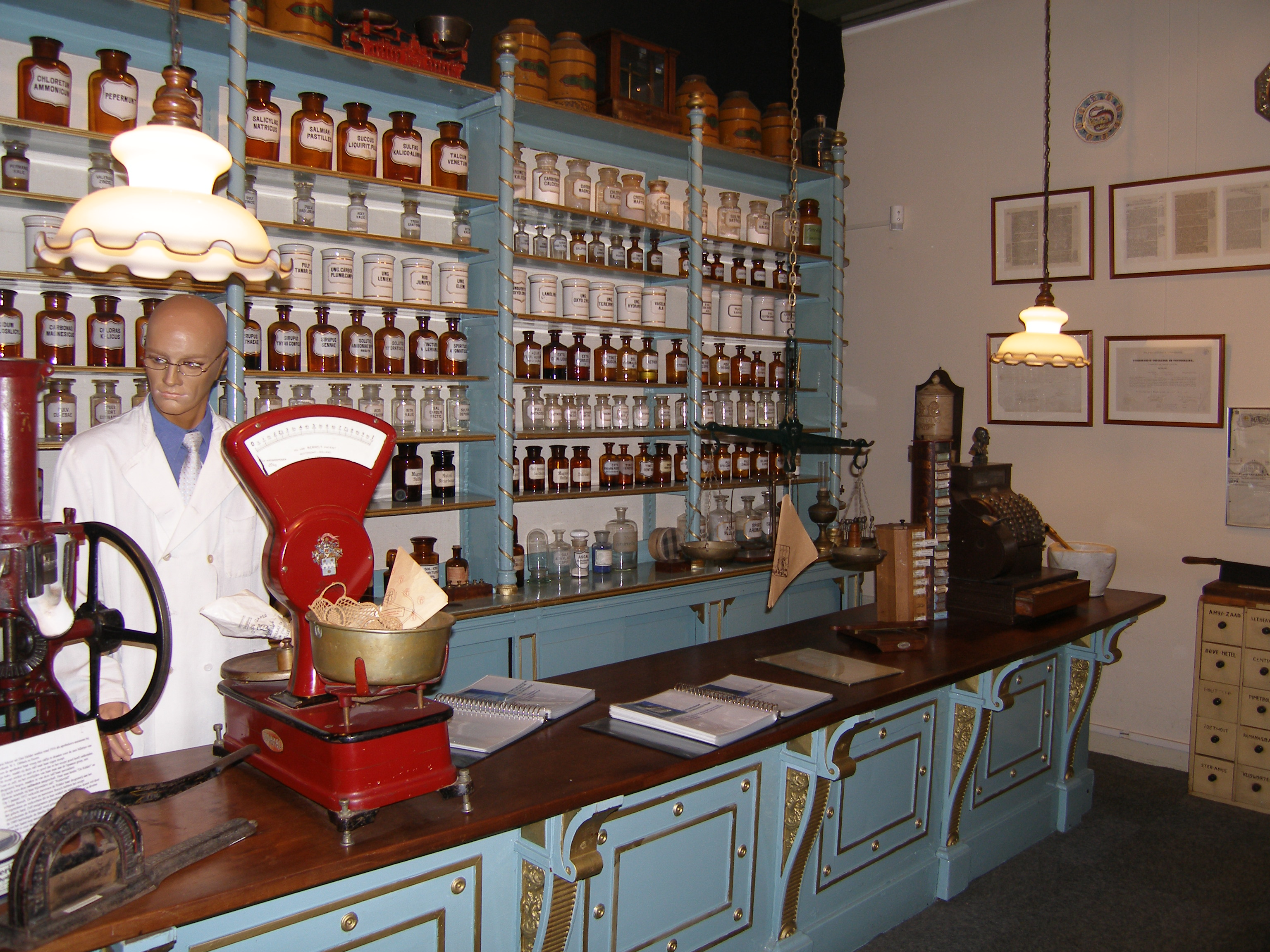 Drogisterij anno 1910